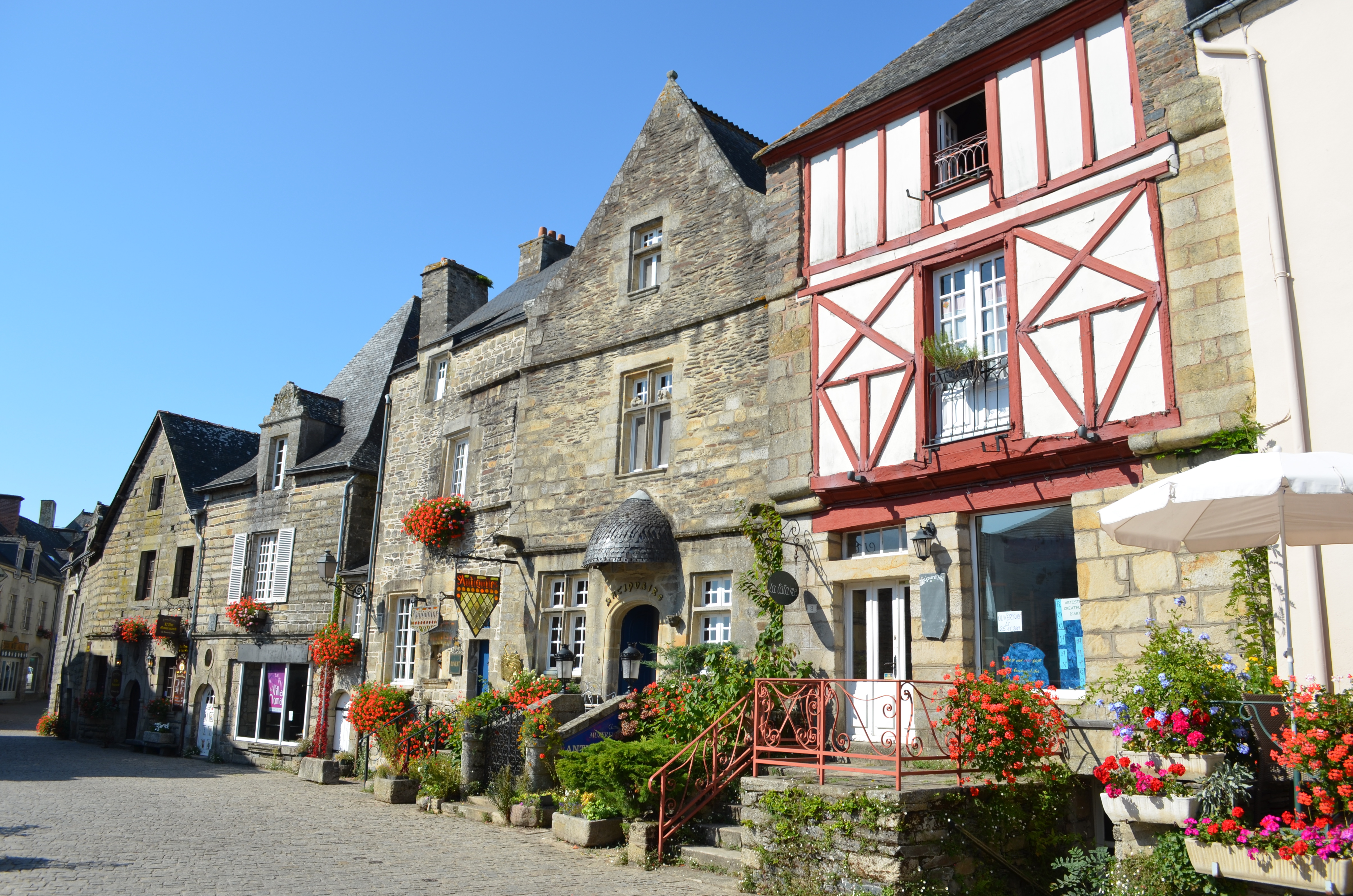 Maisons classées dont maison de 1601 avec l'oeil de boeuf au dessus de la porte - Rochefort-en-Terre .